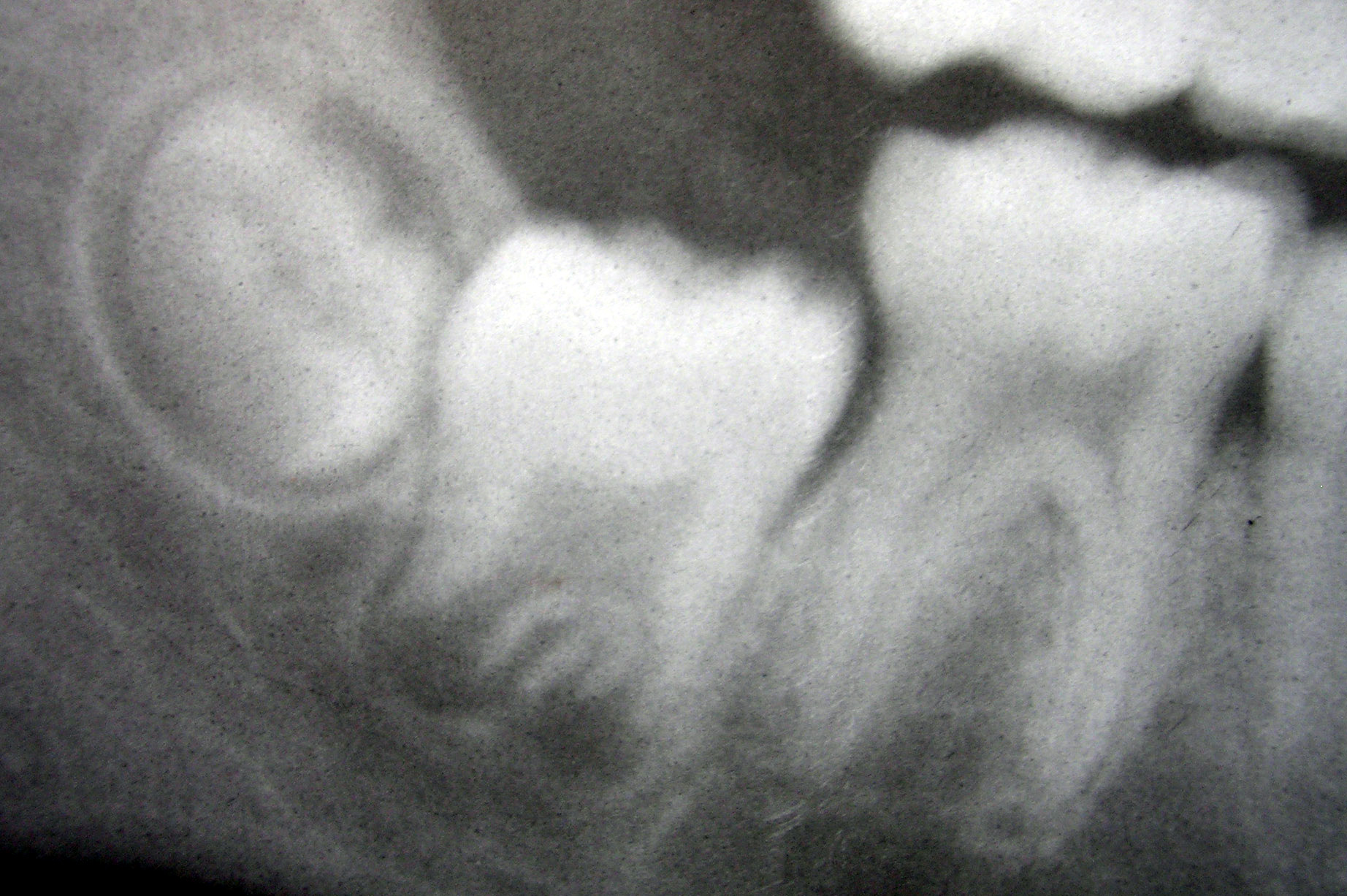 Radiografía del tercer, segundo y primer molar de la mandíbula, de izquierda a derecha, en distintos estadios de desarrollo. Radiograph of lower right 3rd, 2nd, and 1st molars in an 11 year old child. Source: Photo taken by user:dozenist